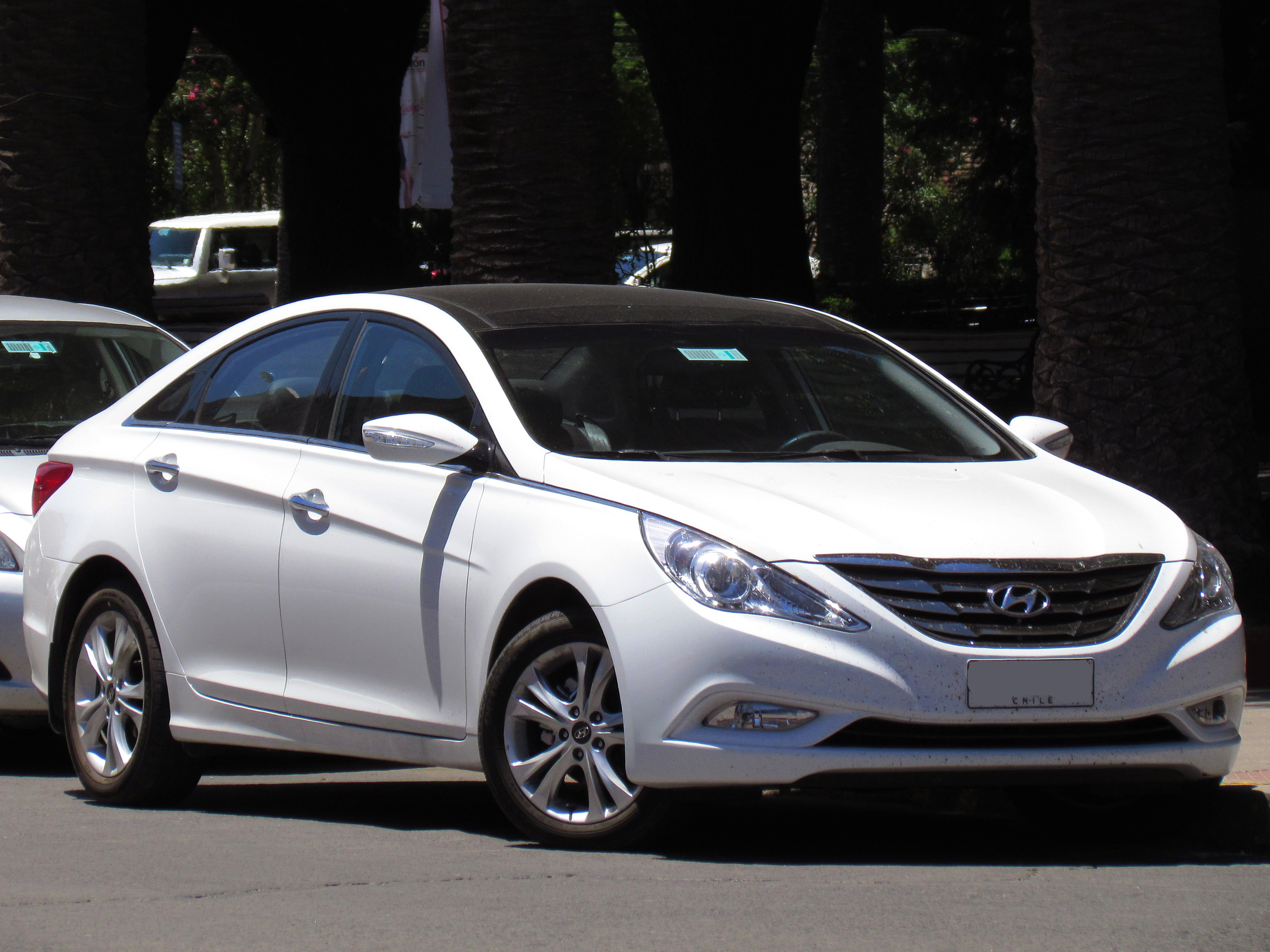 Hyundai Sonata 2.0 GLS 2011